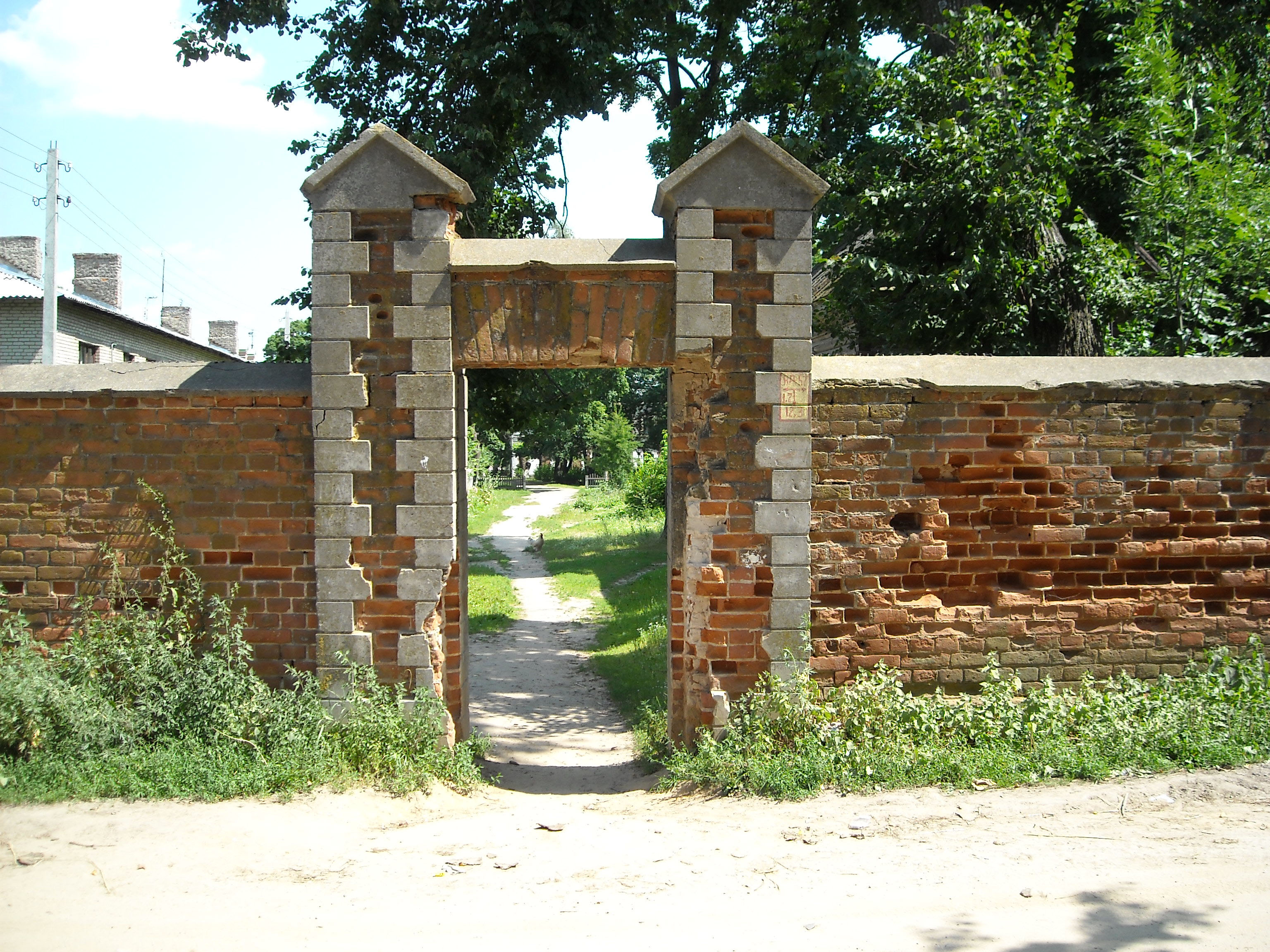 Беларуская (тарашкевіца): Палацава-паркавы комплекс Козелаў-Паклеўскіх. в. Красны Бераг This is a photo of Belarusian heritage monument. Reference number: 312Г000324 ( WLM)